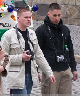 Sebastian Reiche und Ralf Wohlleben